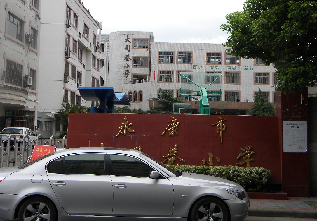 中国浙江省永康市大司巷小学